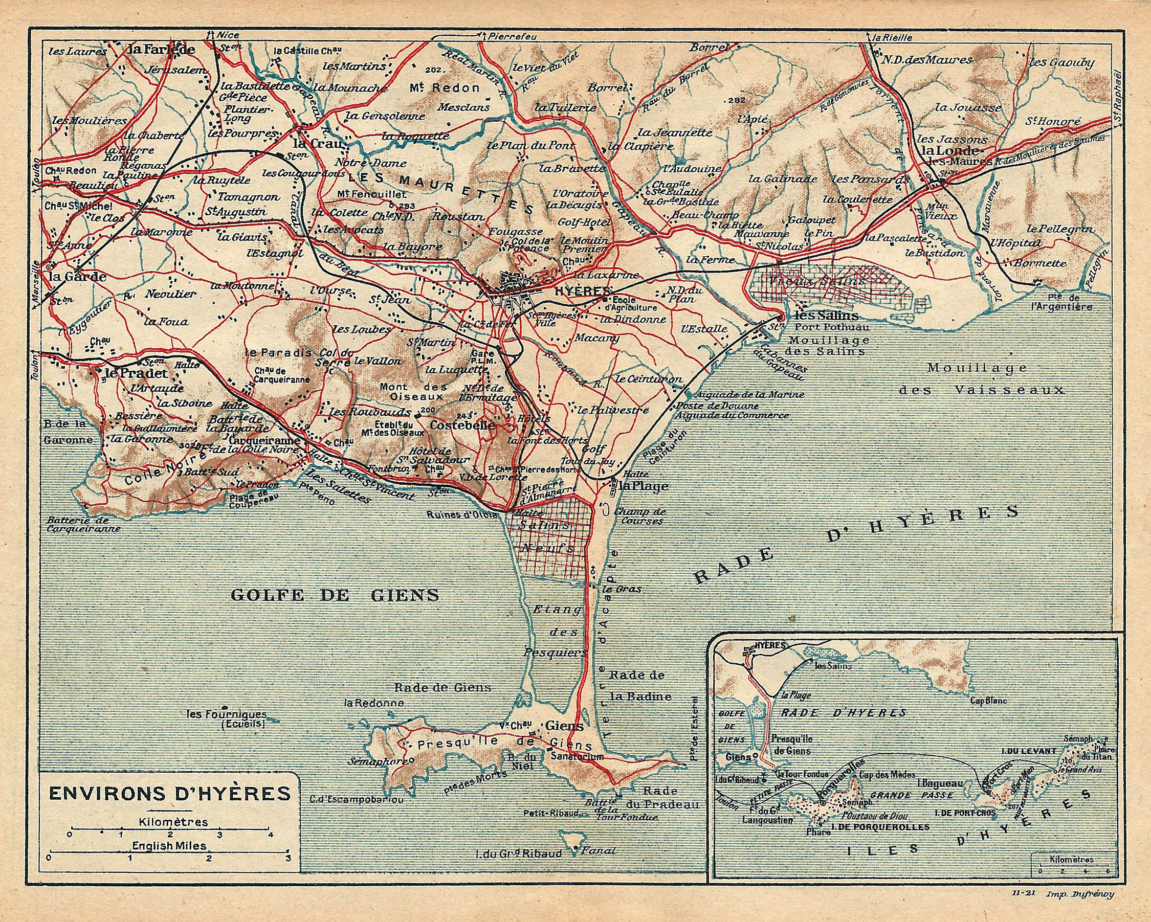 Carte de la Provence (1921) : environs d'Hyères.